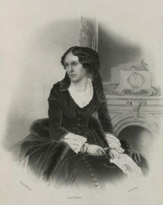 Надежда Петровна Базилевская, урожденная Озерова (1810—1863)